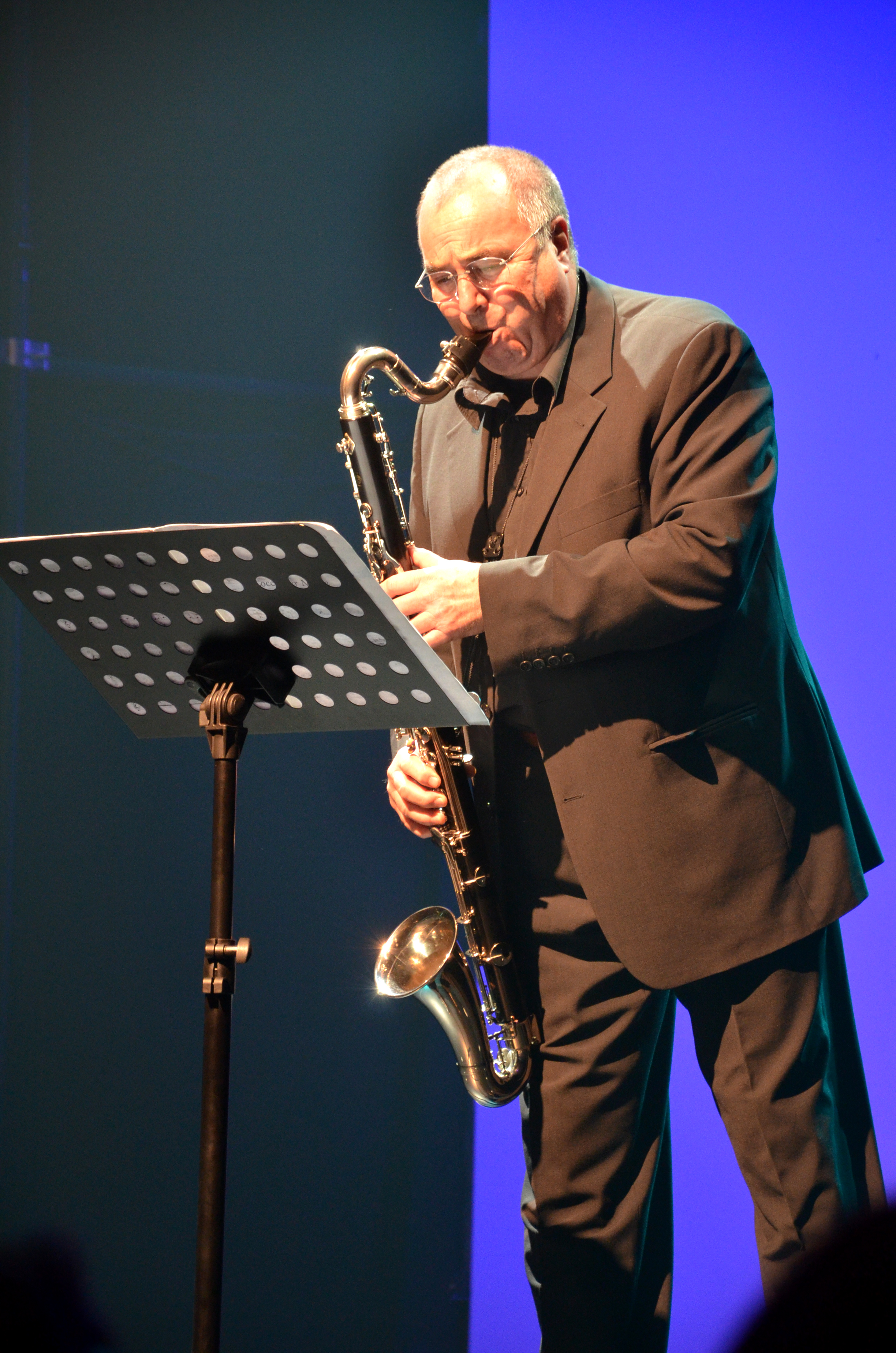 Der Musiker Lothar Krist eröffnete die Preisverleihung mit der von ihm anlässlich des 850jährigen Bestehens des Klosters Loccum komponierten und am 7. September 2013 uraufgeführten „Loccumer Messe“ (auch: „Loccumer Jazzmesse“) auf der Bassklarinette ...